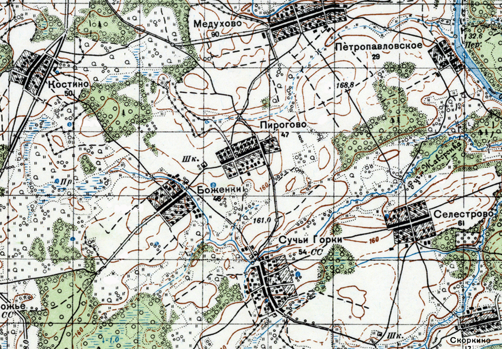 д.Пирогово Новоторжского района на карте 1930-х годов.